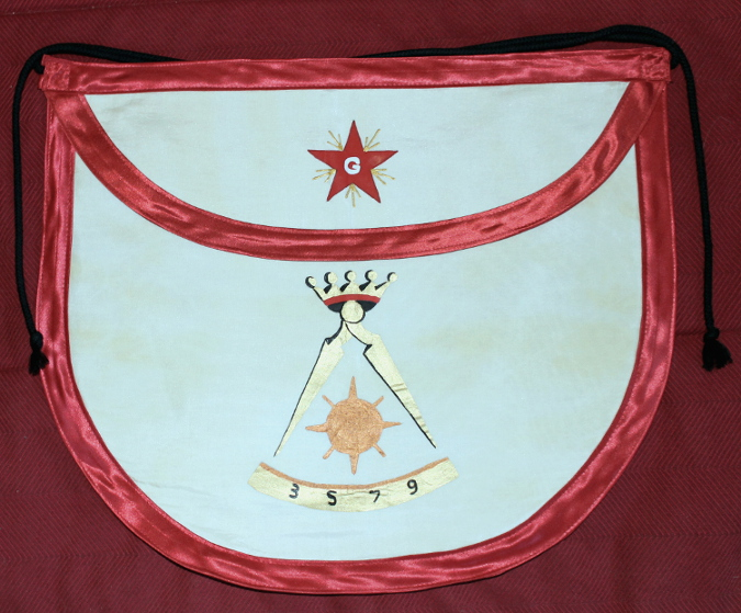 Tablier peint sur soie du Template:2e Ordre du Rite français moderne